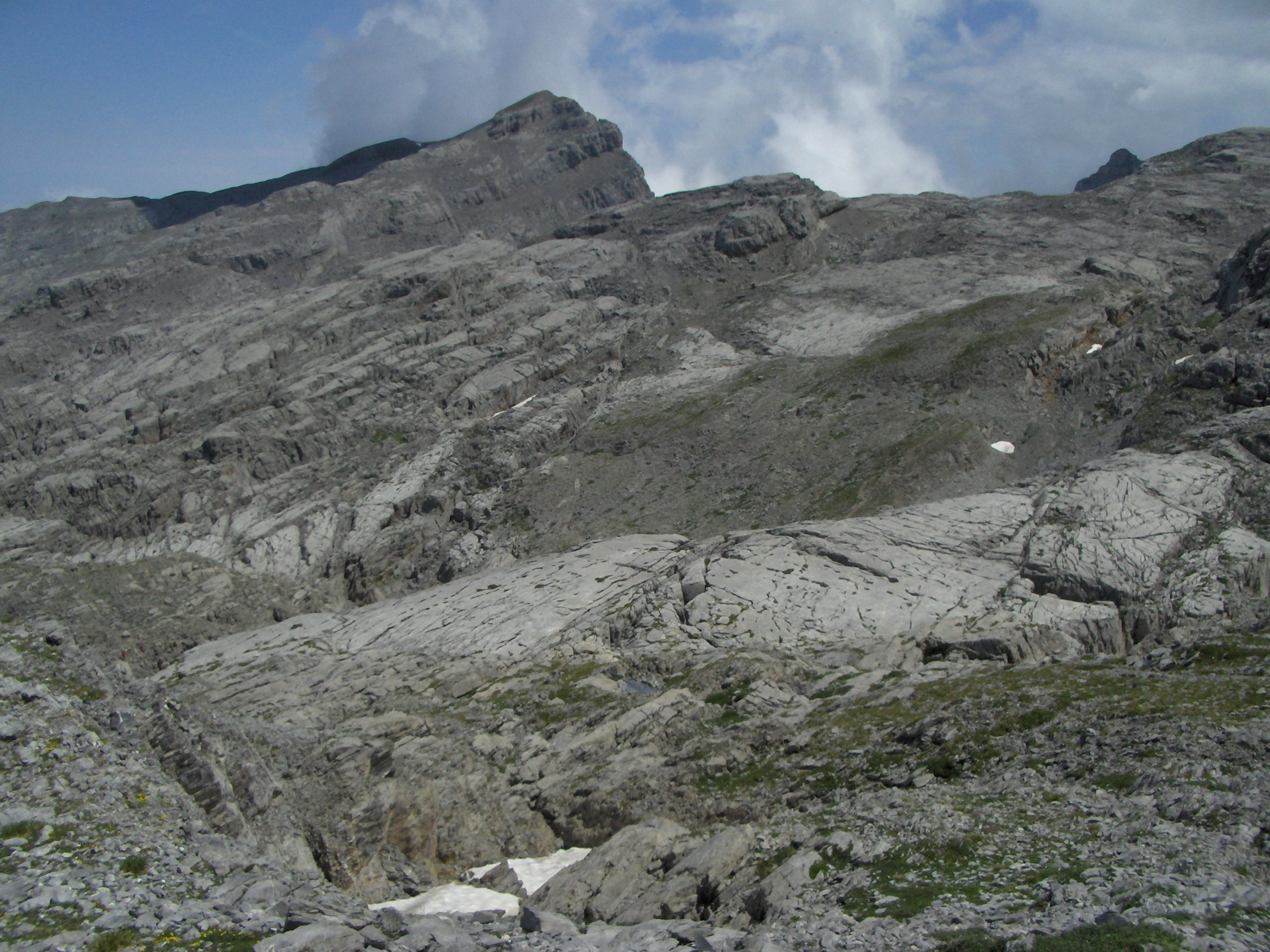 Photographie au sud du Pourtet et à proximité du gouffre des Partages dans le massif de la Pierre-Saint-Martin .